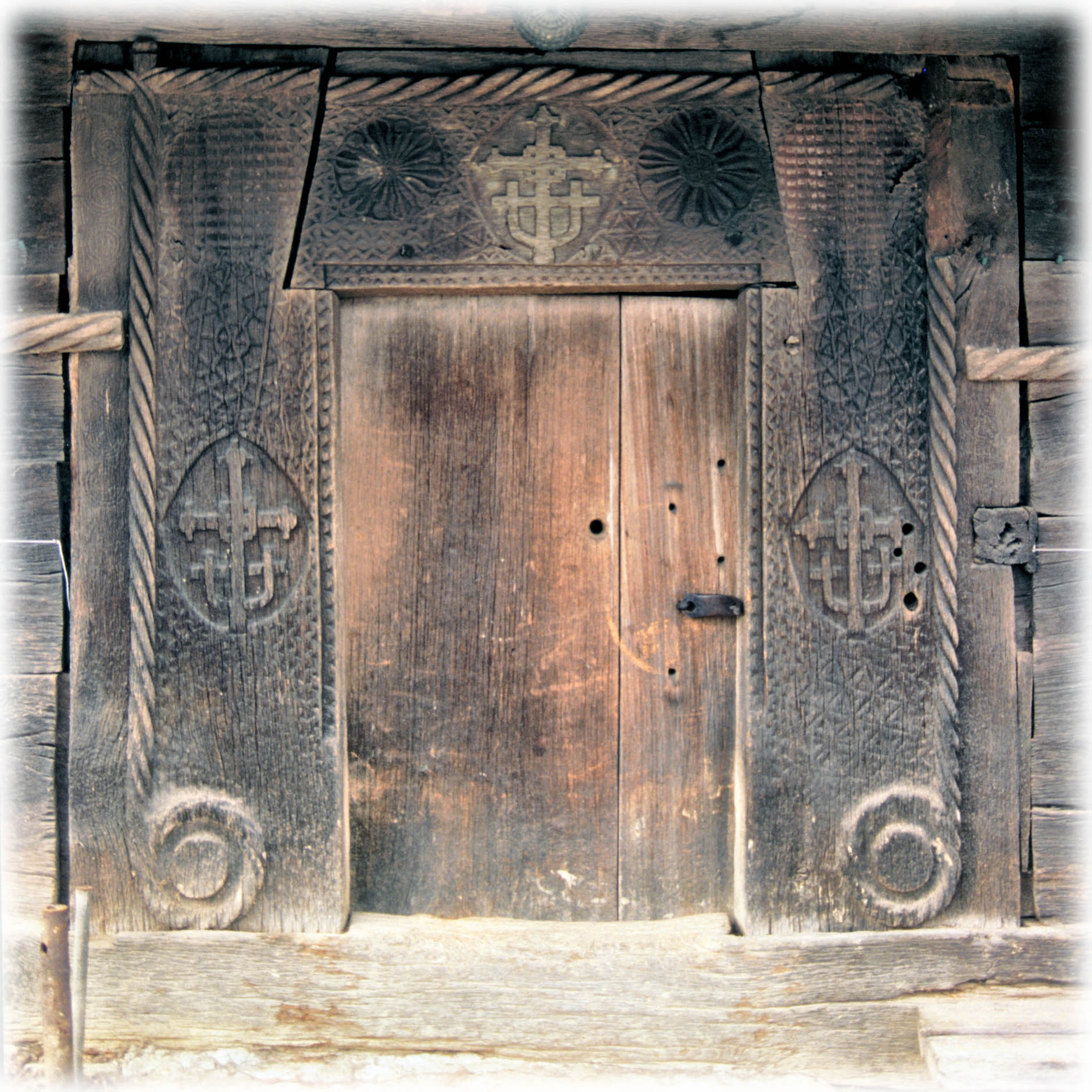 Portalul bisericii din Sârbi Susani.